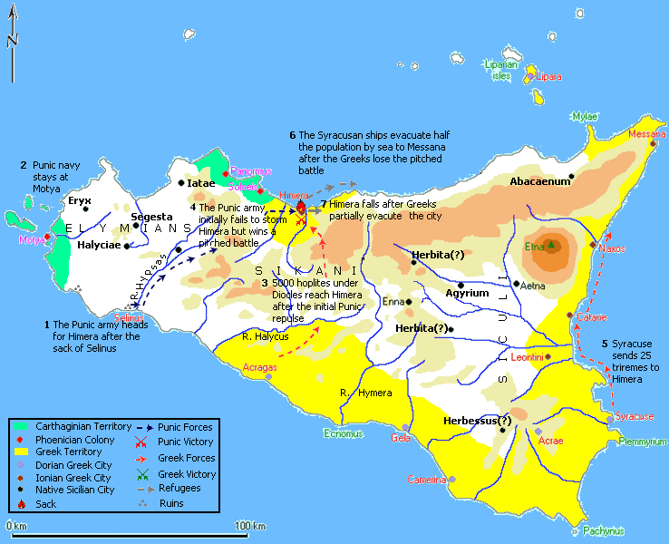 Battaglia di Himera, 409 a.C.